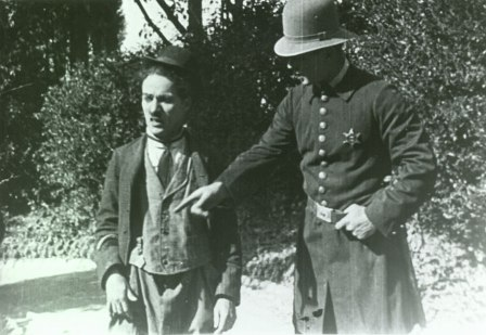 Twenty_Minutes_of_Love: Фрагмент фільму «Двадцять хвилин любові»